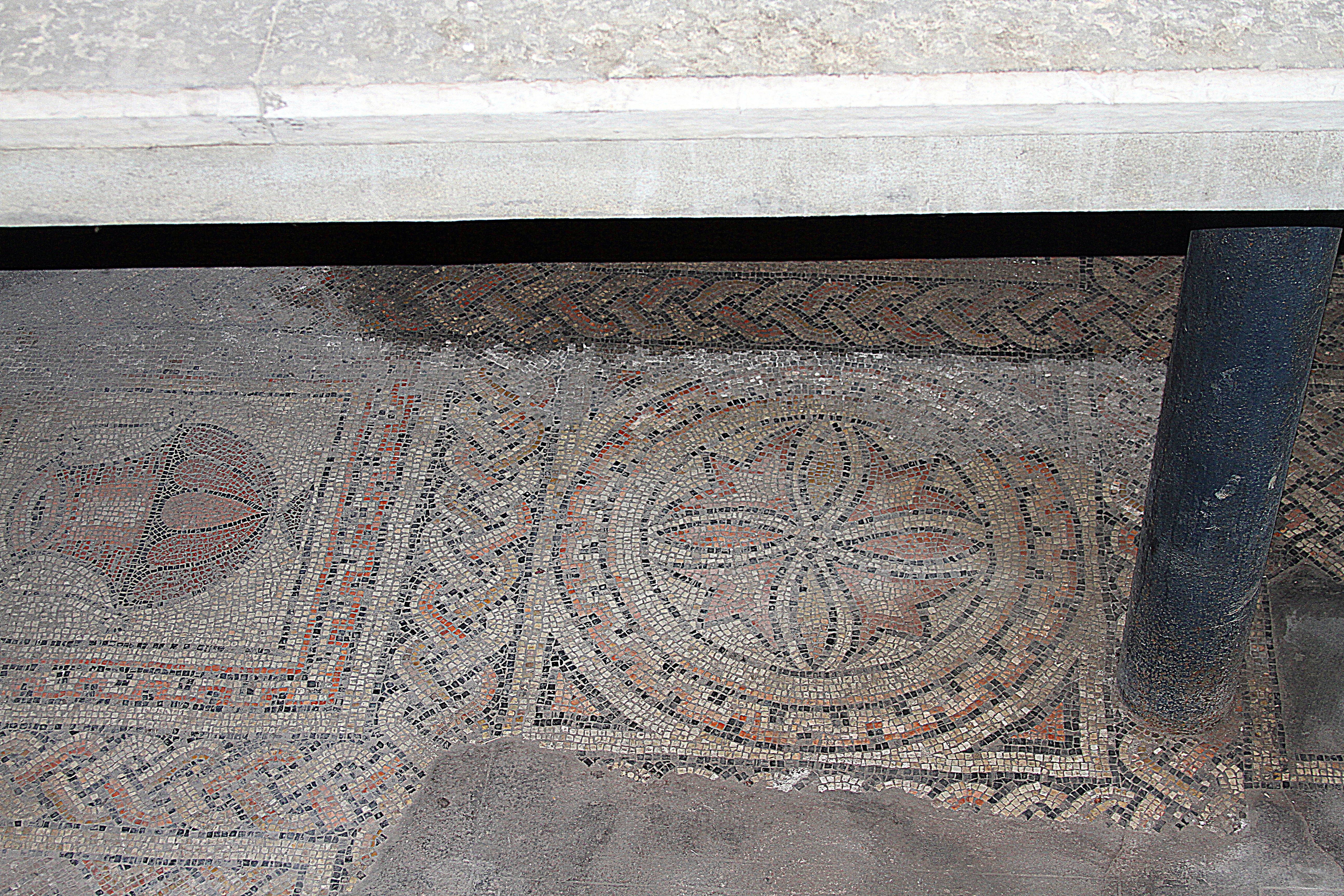 Duomo - Verona